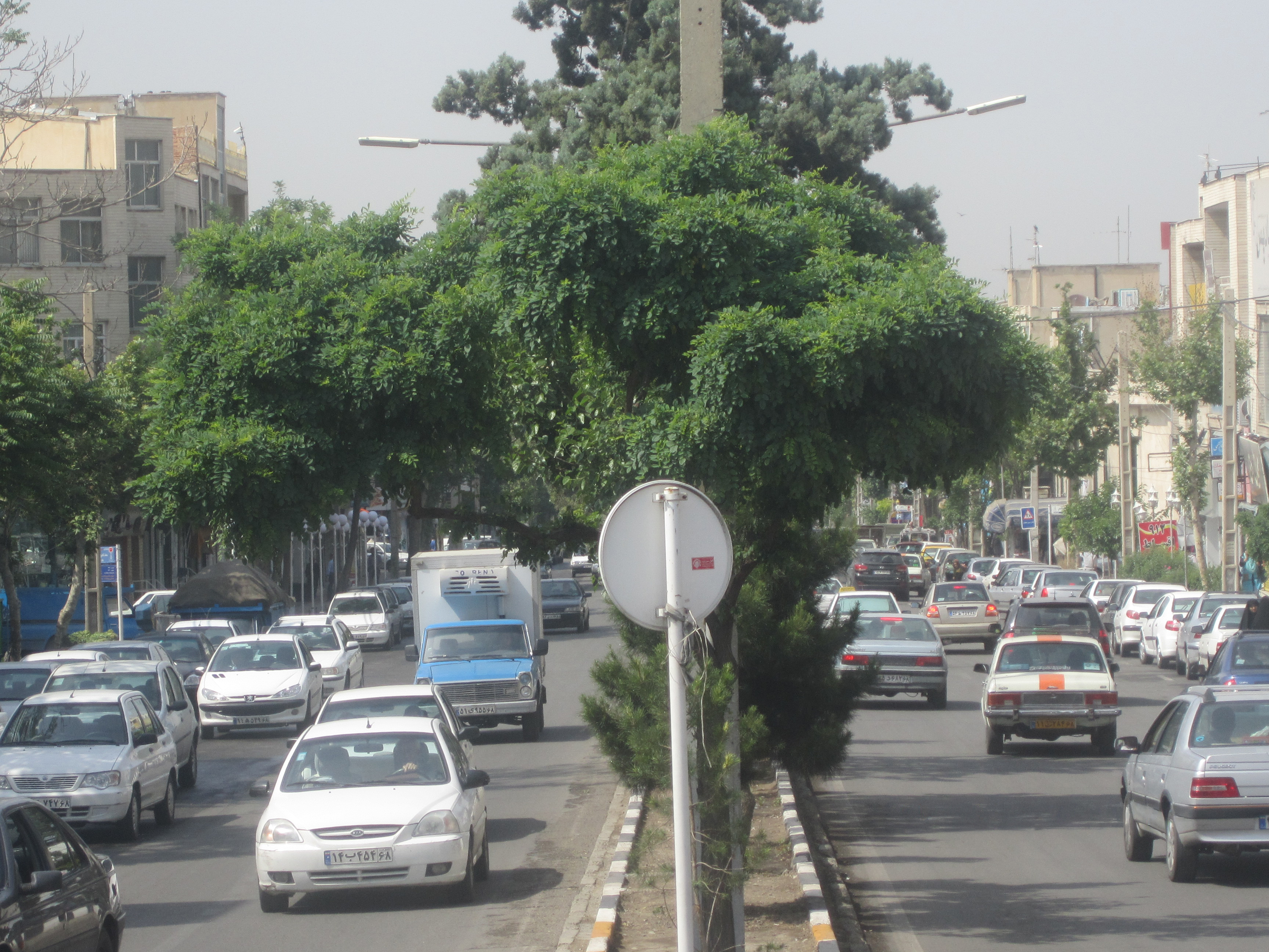 نمای شمال به جنوب خیابان رستاخیز، گوهردشت، کرج